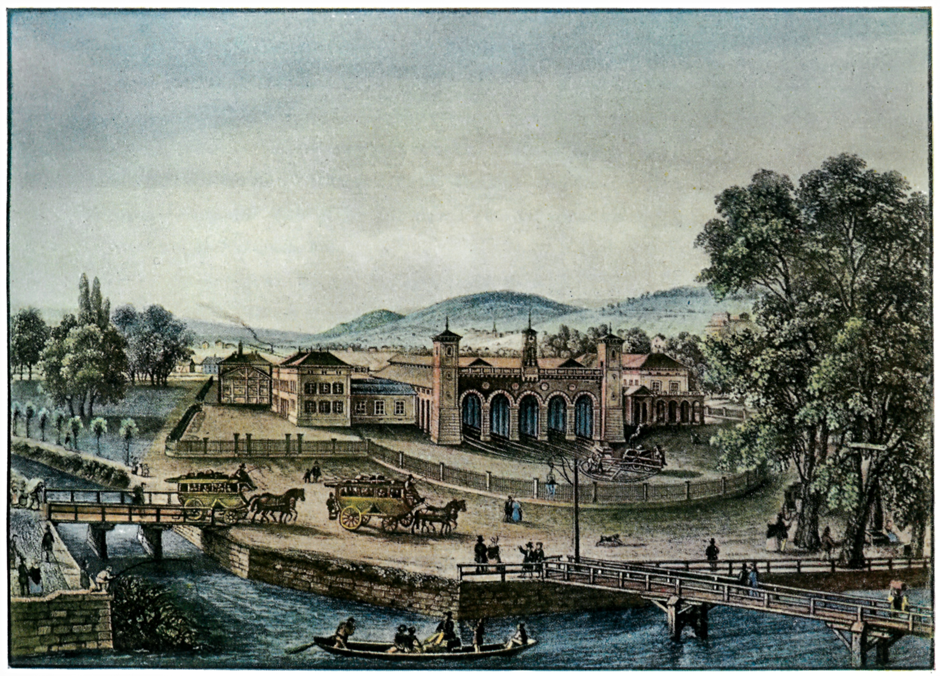 Bahnhof Zürich 1847